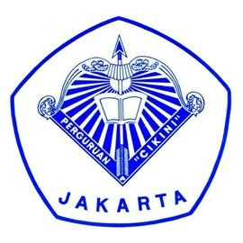 Logo Yayasan Perguruan "Cikini"